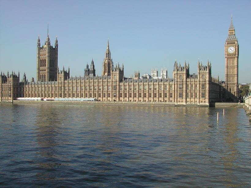 Palazzo di Westminster (Il Parlamento)